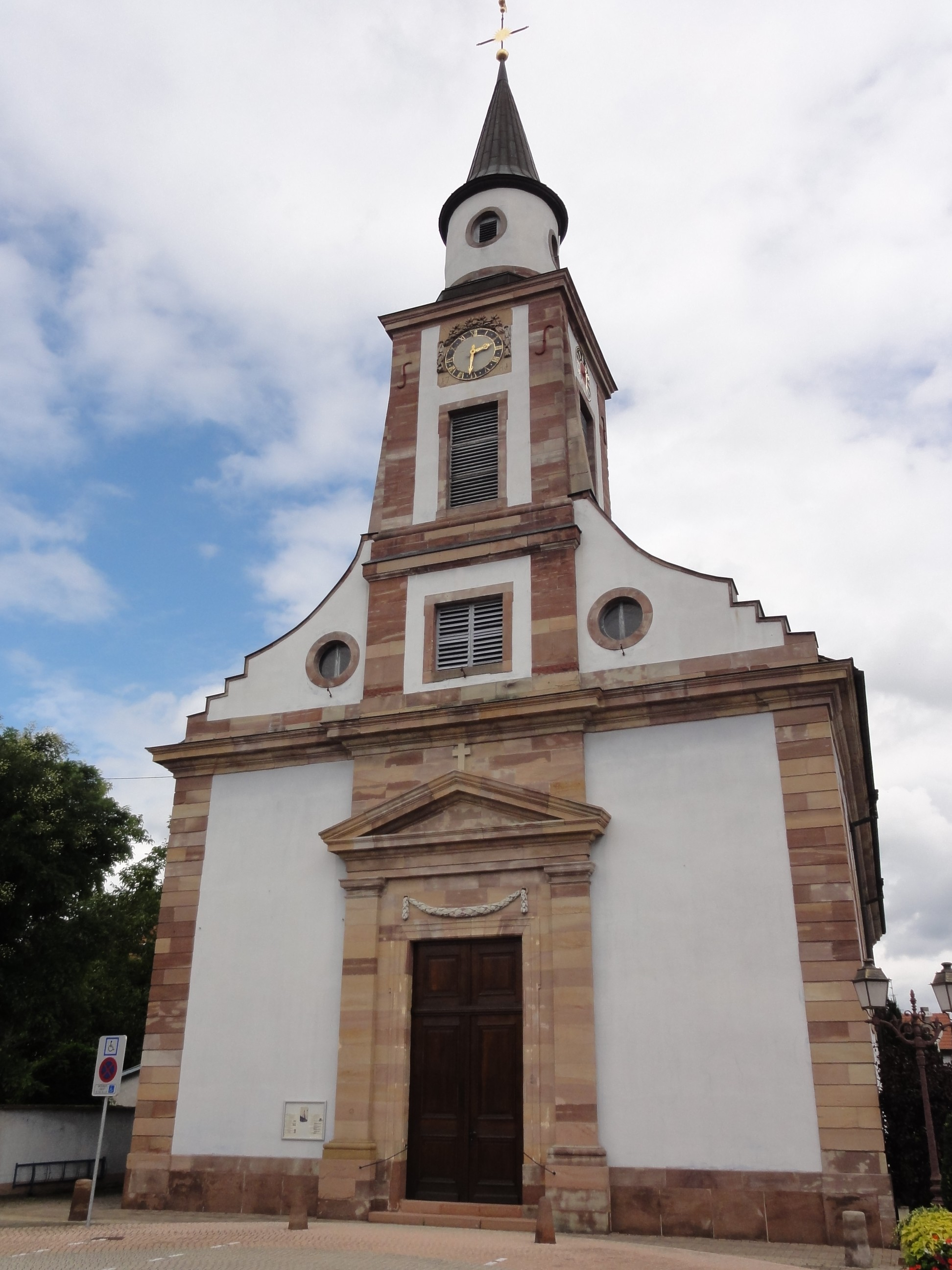 Alsace, Bas-Rhin, Souffelweyersheim, Église Saint-Georges (1781): .